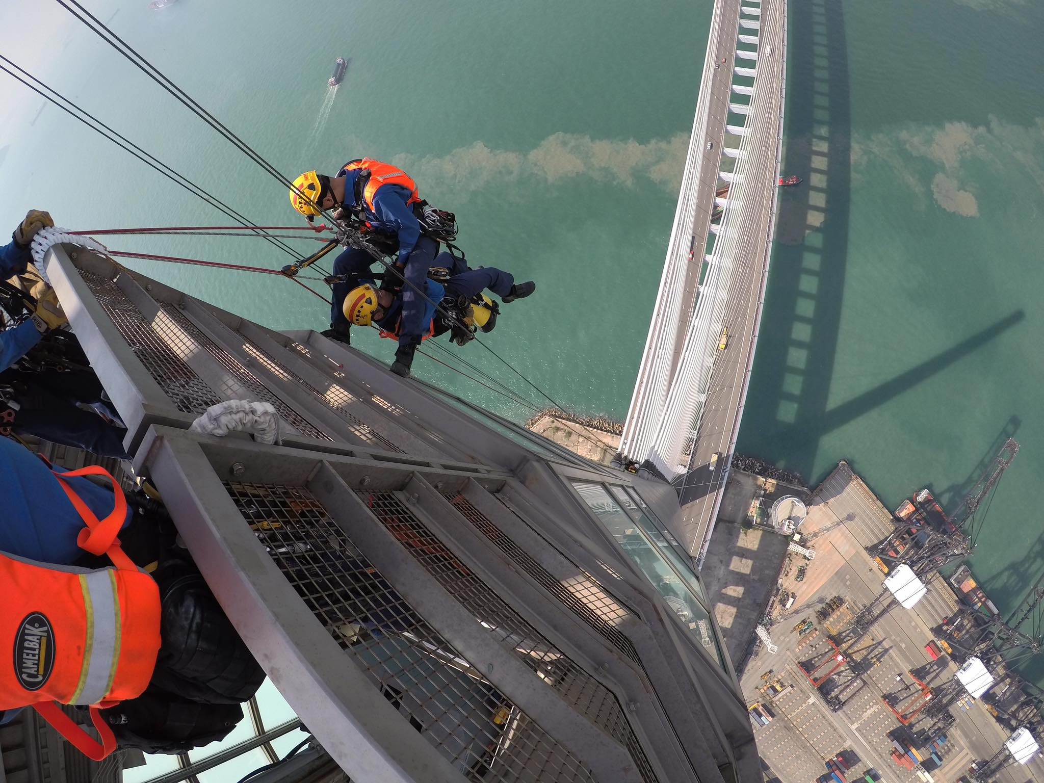 粵語: 昂船洲大橋